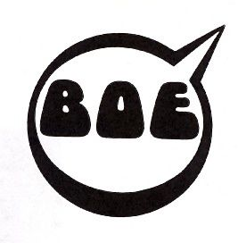 Logo van BOE